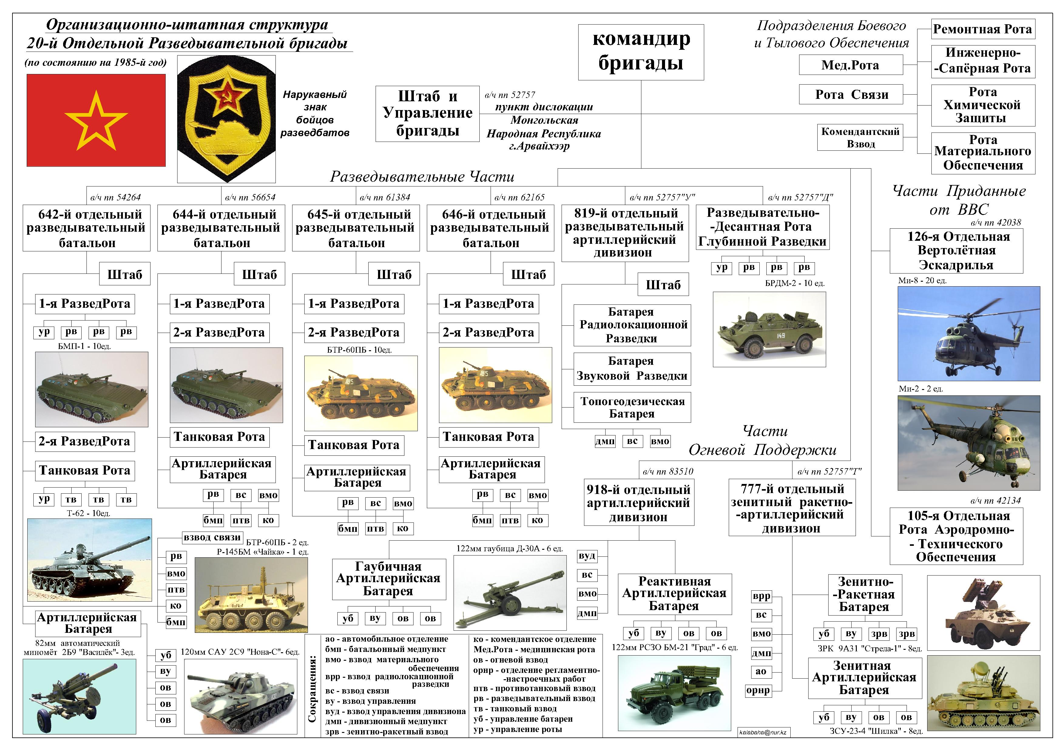 Организационно-штатная структура 20-й Отдельной разведывательной бригады в составе группы советских войск в Монгольской Народной Республике, по состоянию на 1985-й год. Составлено по материалам, взятым в статье "20-я отдельная разведывательная бригада" на сайте - - а также по данным, взятым у группы ветеранов 20-й ОРБр на "Одноклассники.Ру"